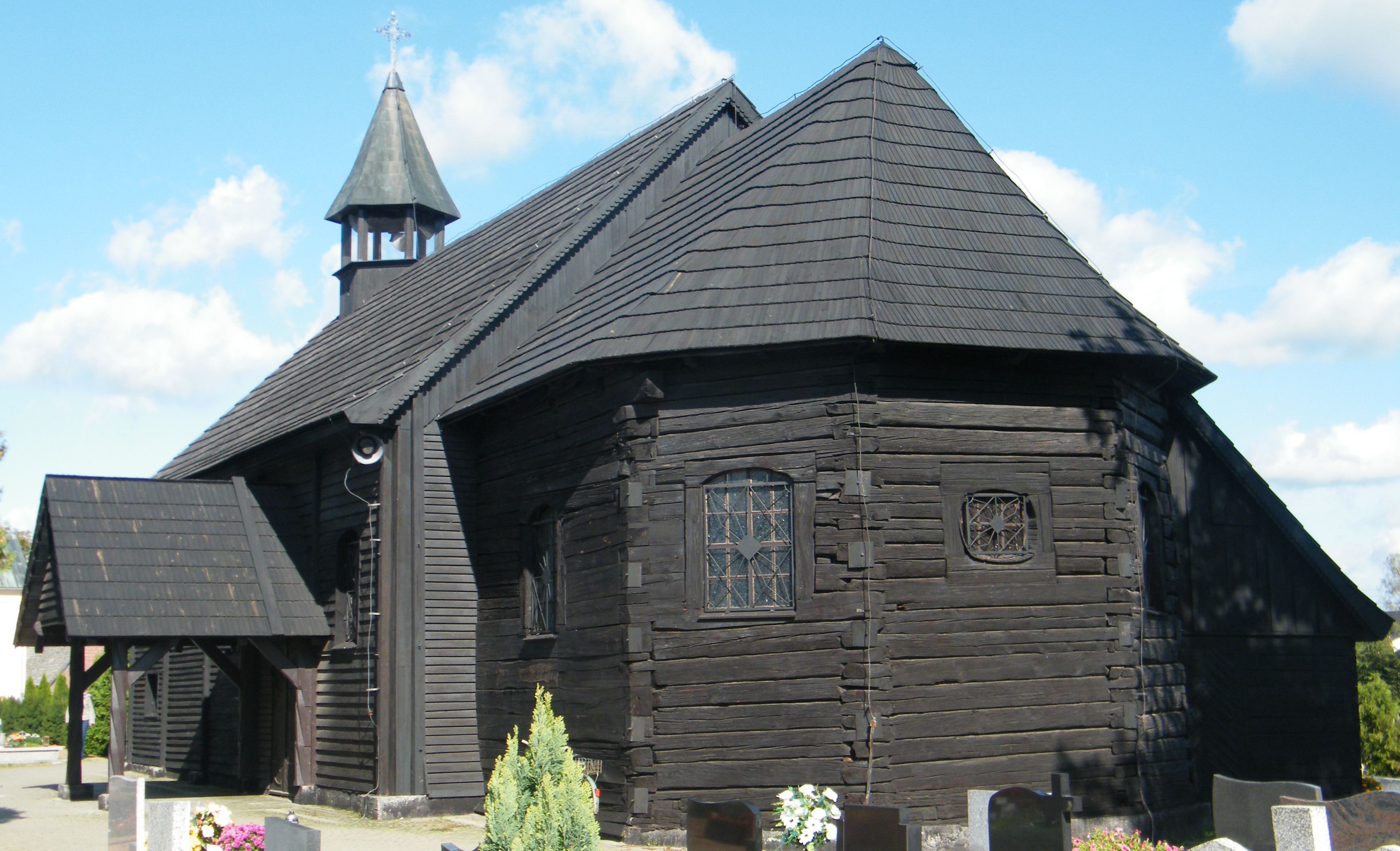 kościół cmentarny p.w. Matki Boskiej i św. Andrzeja Popielów, ul. Dworcowa, Popielów 06.1954.